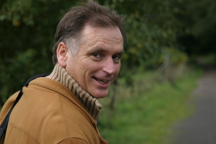 Rüdiger Heins im Jahr 2012